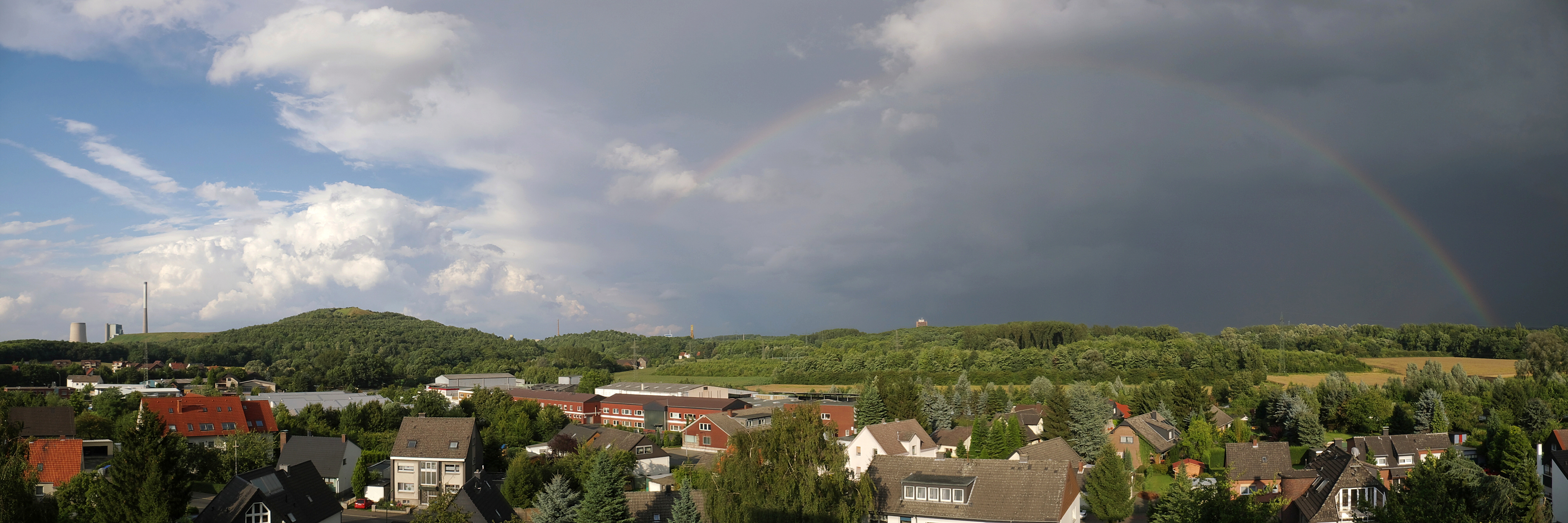 Blick auf die teilrenaturierte Bergehalden "Großes Holz" und "Adener Höhe" in Bergkamen. Im Hintergrund links das Steinkohlekraftwerk Bergkamen-Heil, etwas links von der Mitte lugt ganz klein das Schachtgerüst Neu-Monopol des Bergwerks Ost hervor